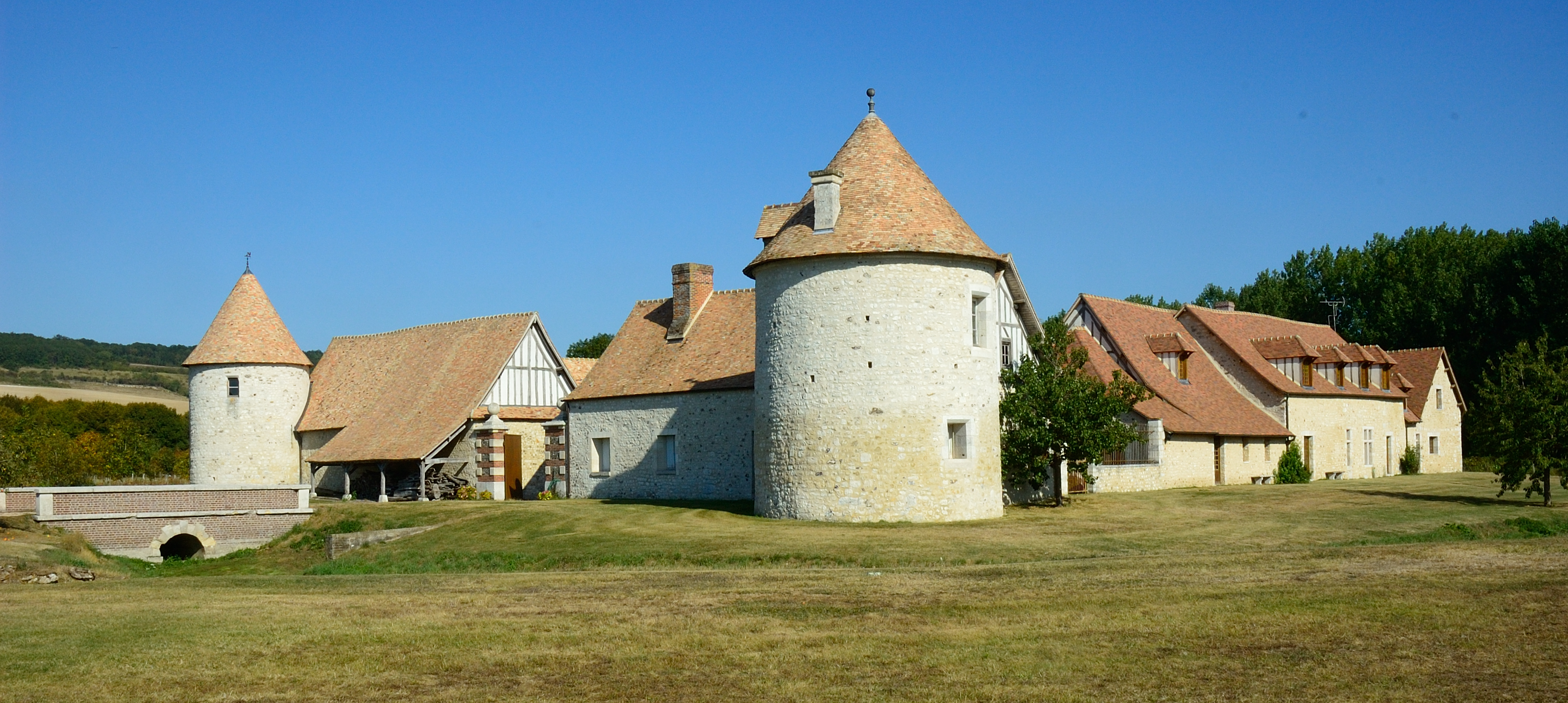 Manoir de La Croix-Saint-Leufroy, La Croix-Saint-Leufroy, Eure, Haute-Normandie, France. Construction: 14e siècle; 15e siècle. .